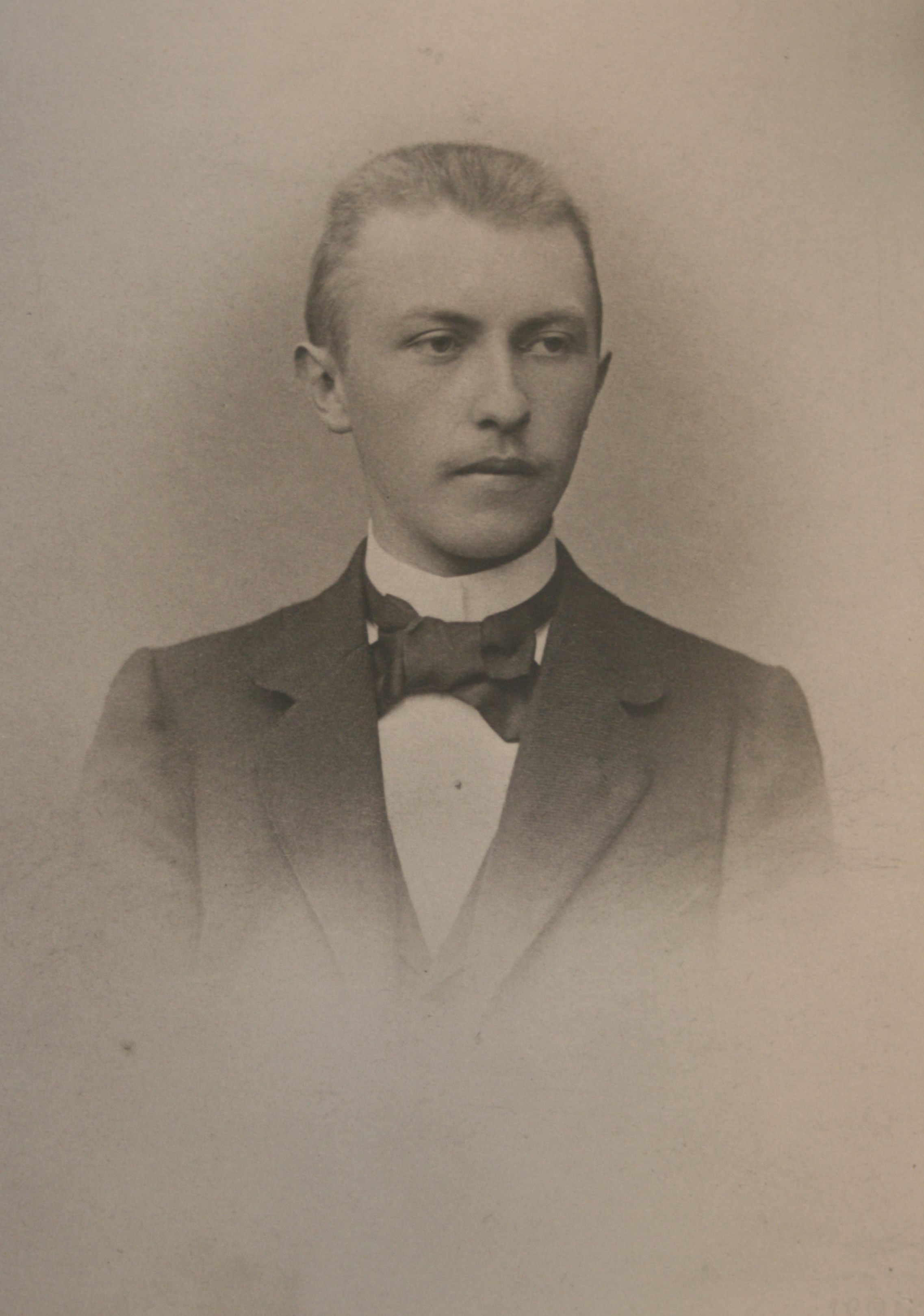 Konrad Adenauer (1876 – 1967)